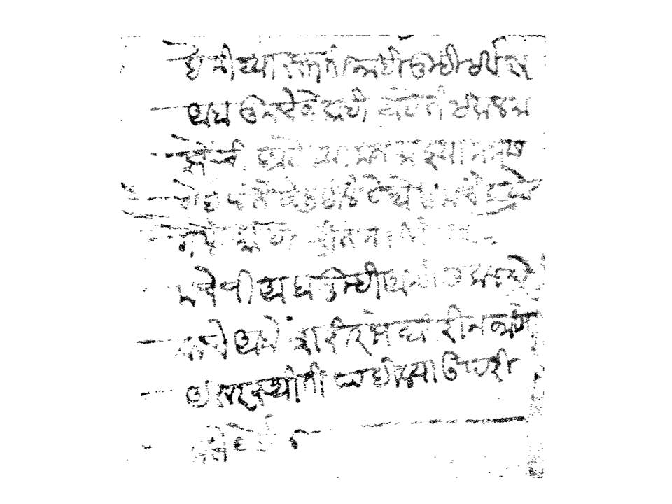 Marathi Handwriting by RamdasSwami Year 1600